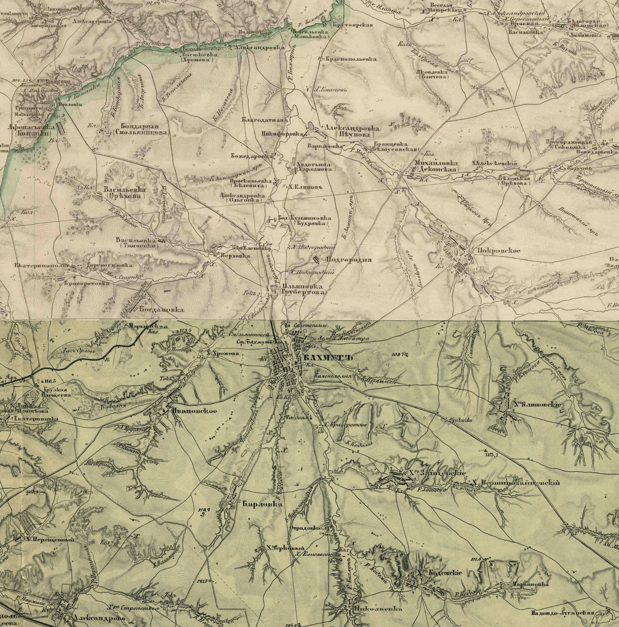 Округа Бахмуту на мапі Шуберта 2-ої половини 19 сторіччя